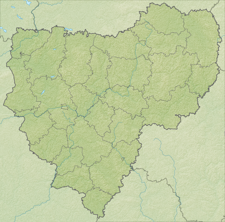 Физическая карта Смоленской области, Россия. Проекция: Меркатор Координаты для GMT: -R30.68/35.46/53.37/56.10 Инструменты: GMT, Inkscape This map may be incomplete, and may contain errors. Don't rely solely on it for navigation.